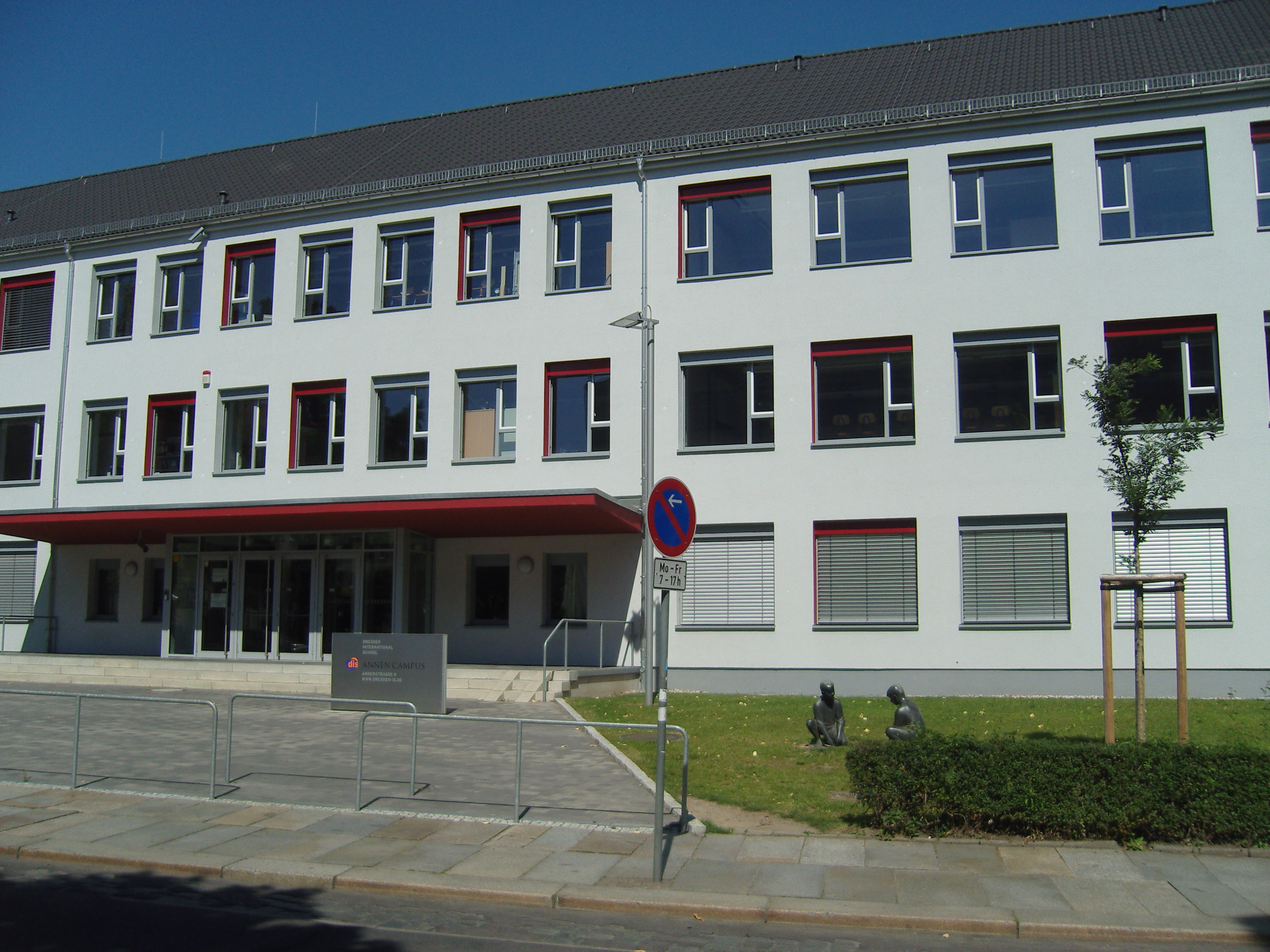 Annenschule in Dresden, vor der Schule eine Plastikgruppe von Hans Klakow